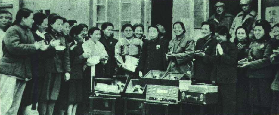 1951年朝鲜战争中刘清扬代表中国妇女向朝鲜送礼